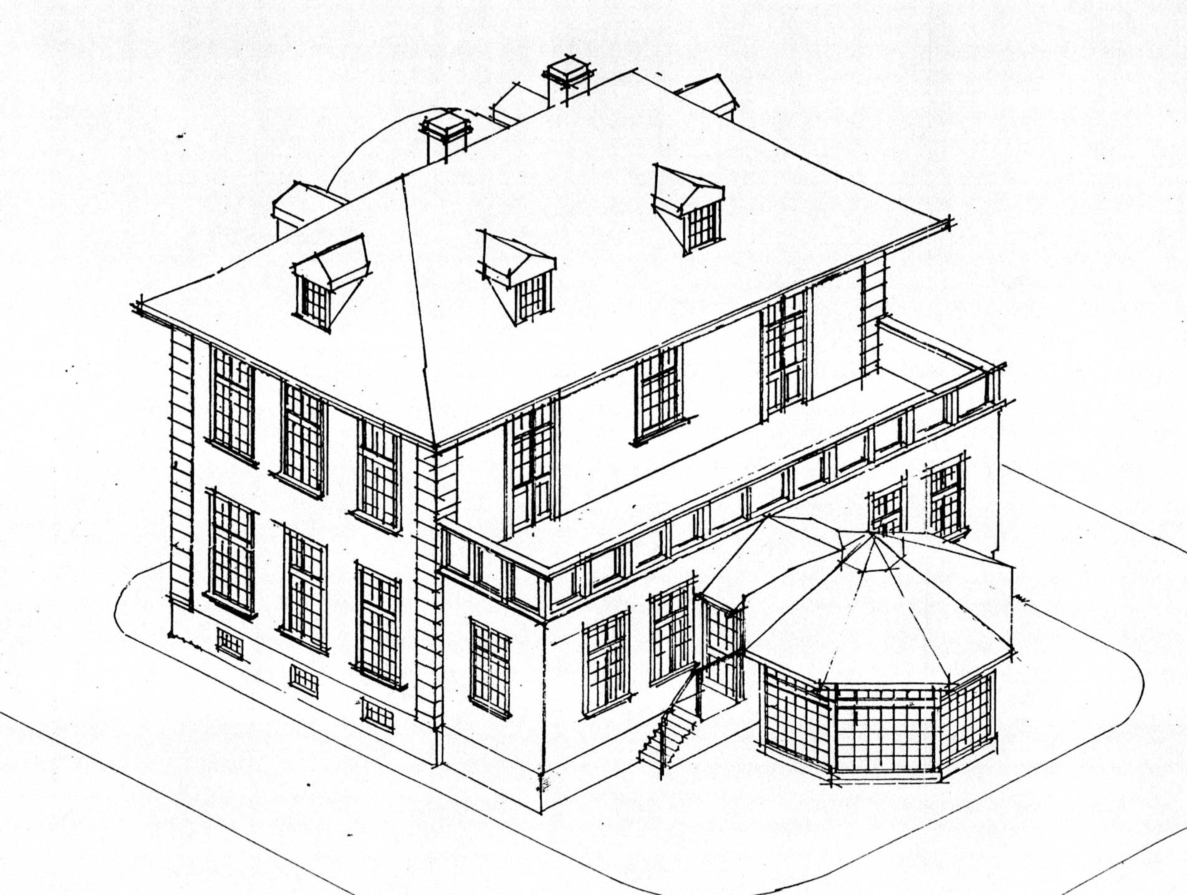 Rysunek z projektu adaptacji dworu na biura dla Zespołu Elektrociepłowni Gdańsk